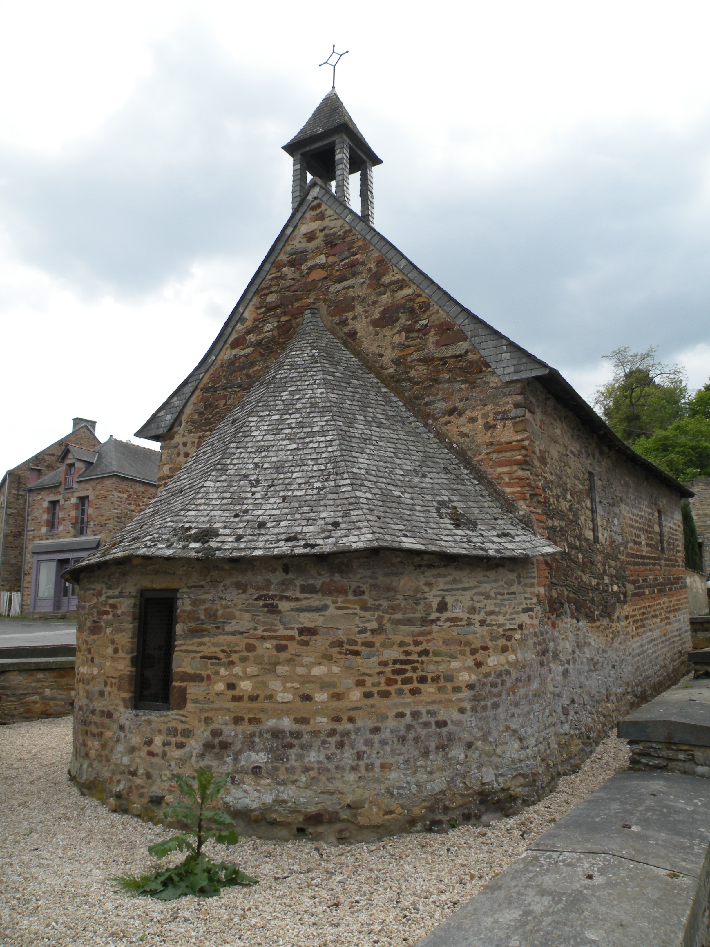 Abside de la chapelle Sainte-Agathe de Langon.